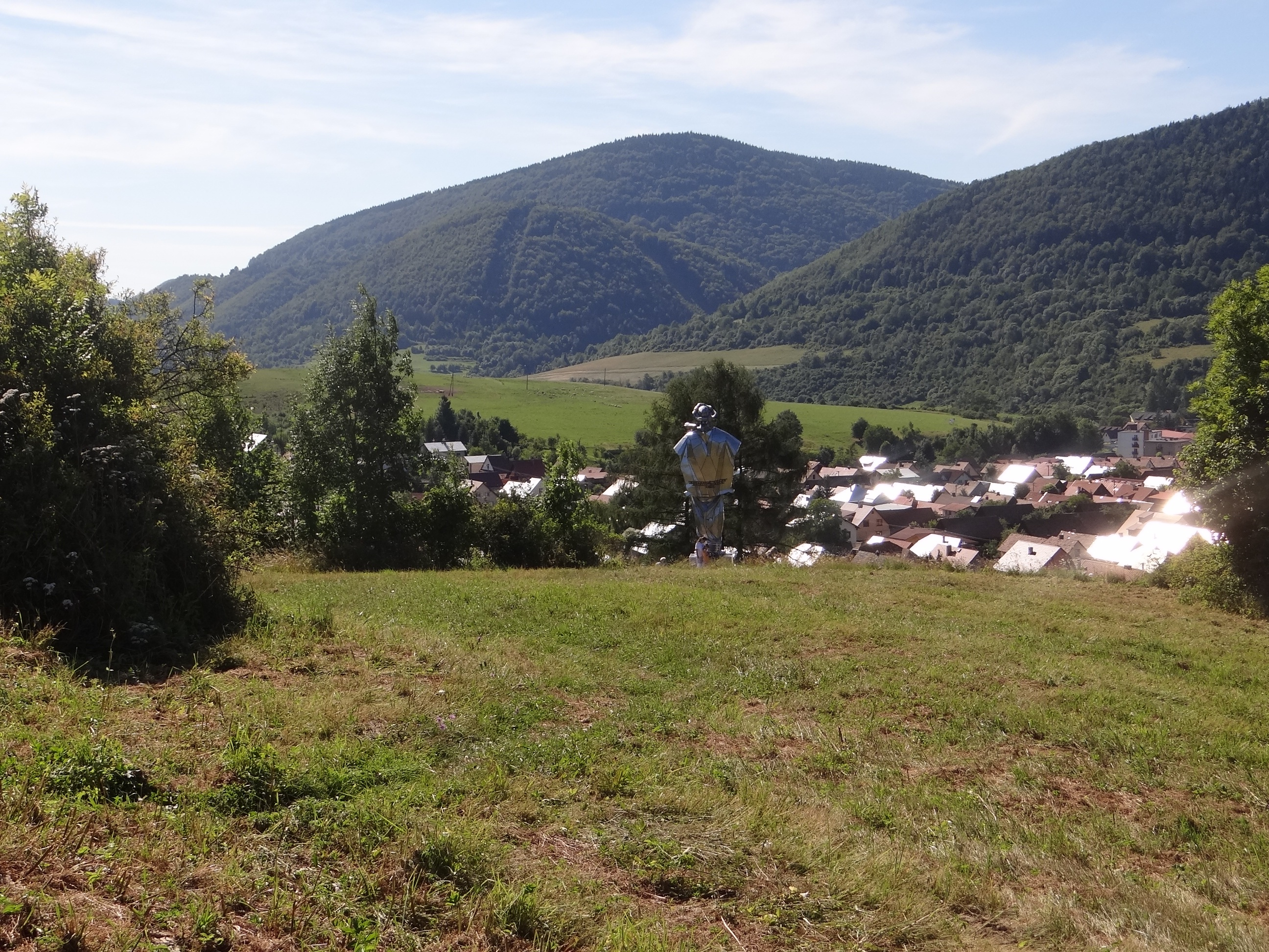 Terchová, Okrúhlica ((Kysucká vrchovina))